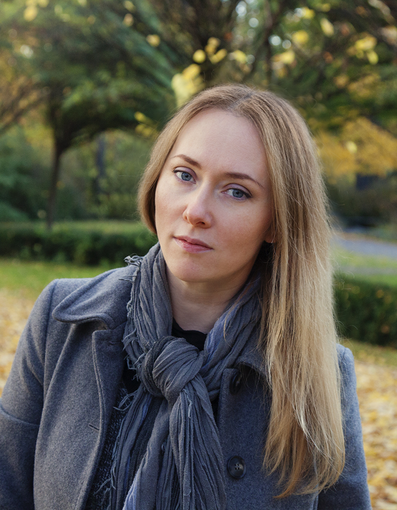 Portrait der Russischen Künstlerin Katerina Belkina. Aufgenommen in Berlin-Weißensee am 26.10.2015 von Karsten Meißner (Wikipedia Autor: Luiboy77). Urheber dieses Bildes ist Karsten Meißner mit dem Einverständnis zur Nutzung von Katerina Belkina.